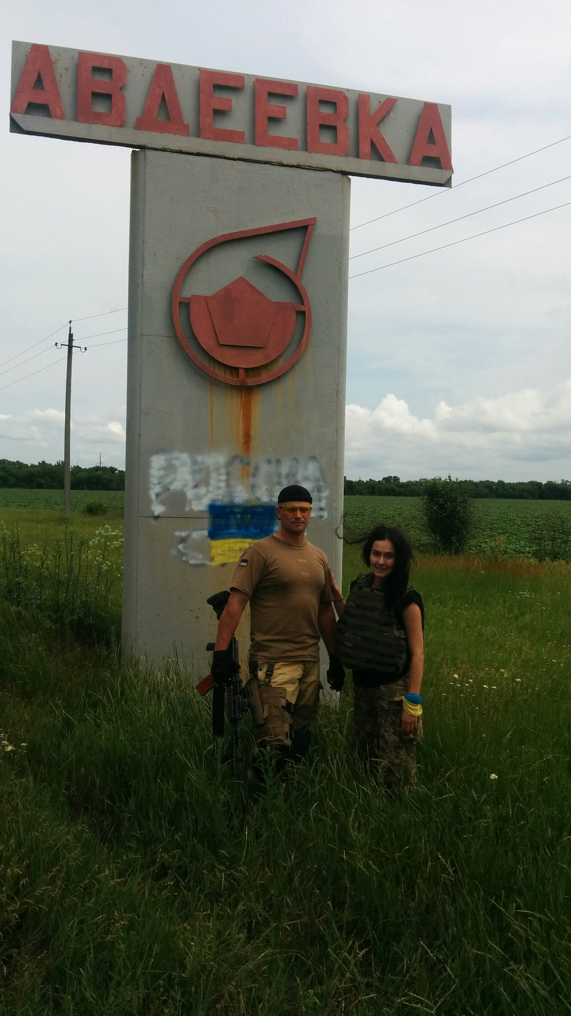 Волонтер на передовой